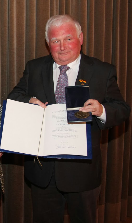 Der ehemalige Präsident des Deutschen Stenografenbundes Karl Wilhelm Henke bei der Verleihung der bronzenen Ehrenplakette, Bundespokalschreiben 2013 in Soest